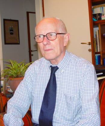 Il giornalista e storico dell'atletica leggera Roberto Luigi Quercetani.